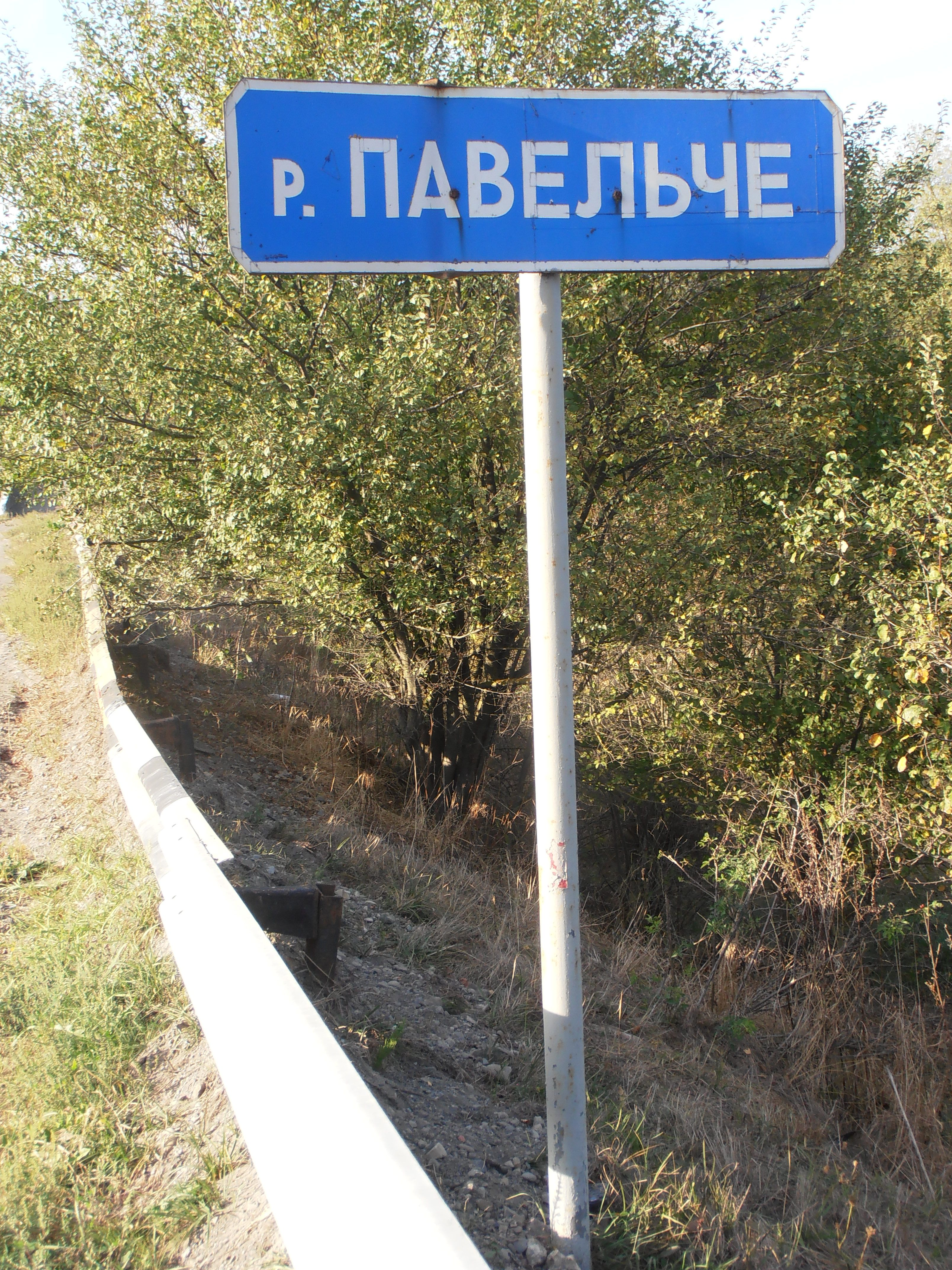 Табличка річки Павельче у Павлівці Тисменецького району